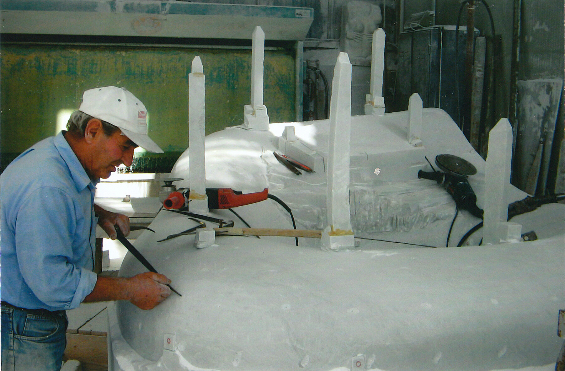 mio padre cardini giulio mentre sta realizzando una scultura.